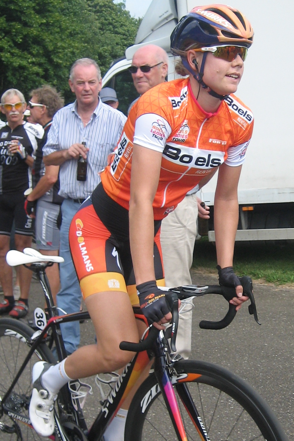 Amalie Dideriksen na de finish van de 3e etappe van de Boels Ladies Tour 2016 in Sittard, Limburg.